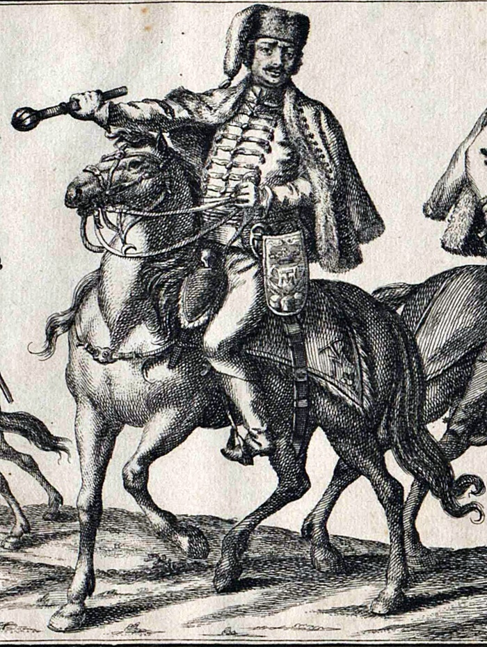 Johann Daniel von Menzel (1698-1744), ungarischer Husarengeneral